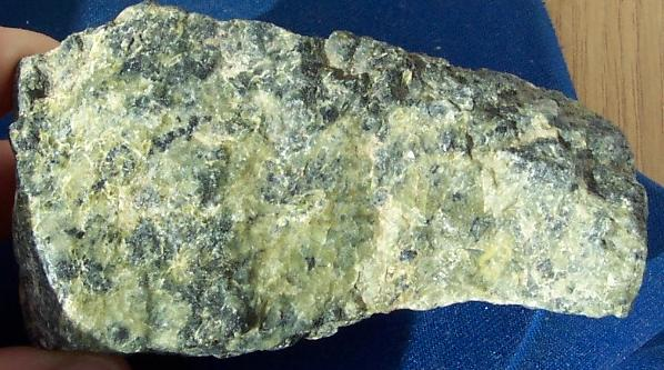 serpentyn, pochodzenie Polska, autor zdjęcia Sebastian Socha 11.10. 2006 r.